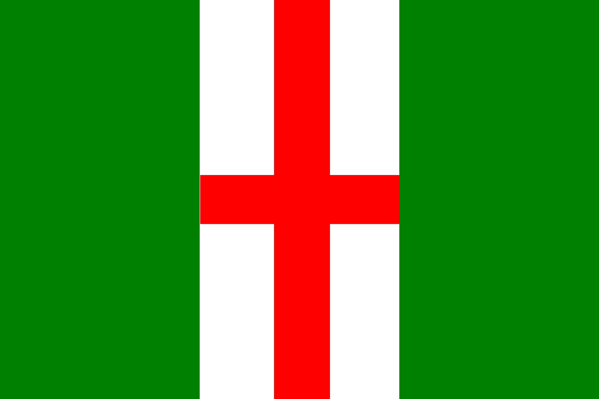 List tvoří tři svislé pruhy, zelený, bílý s červeným svatojiřským středovým křížem a zelený. Šířka ramen kříže je 1/12 délky listu. Poměr šířky k délce listu je 2 : 3.